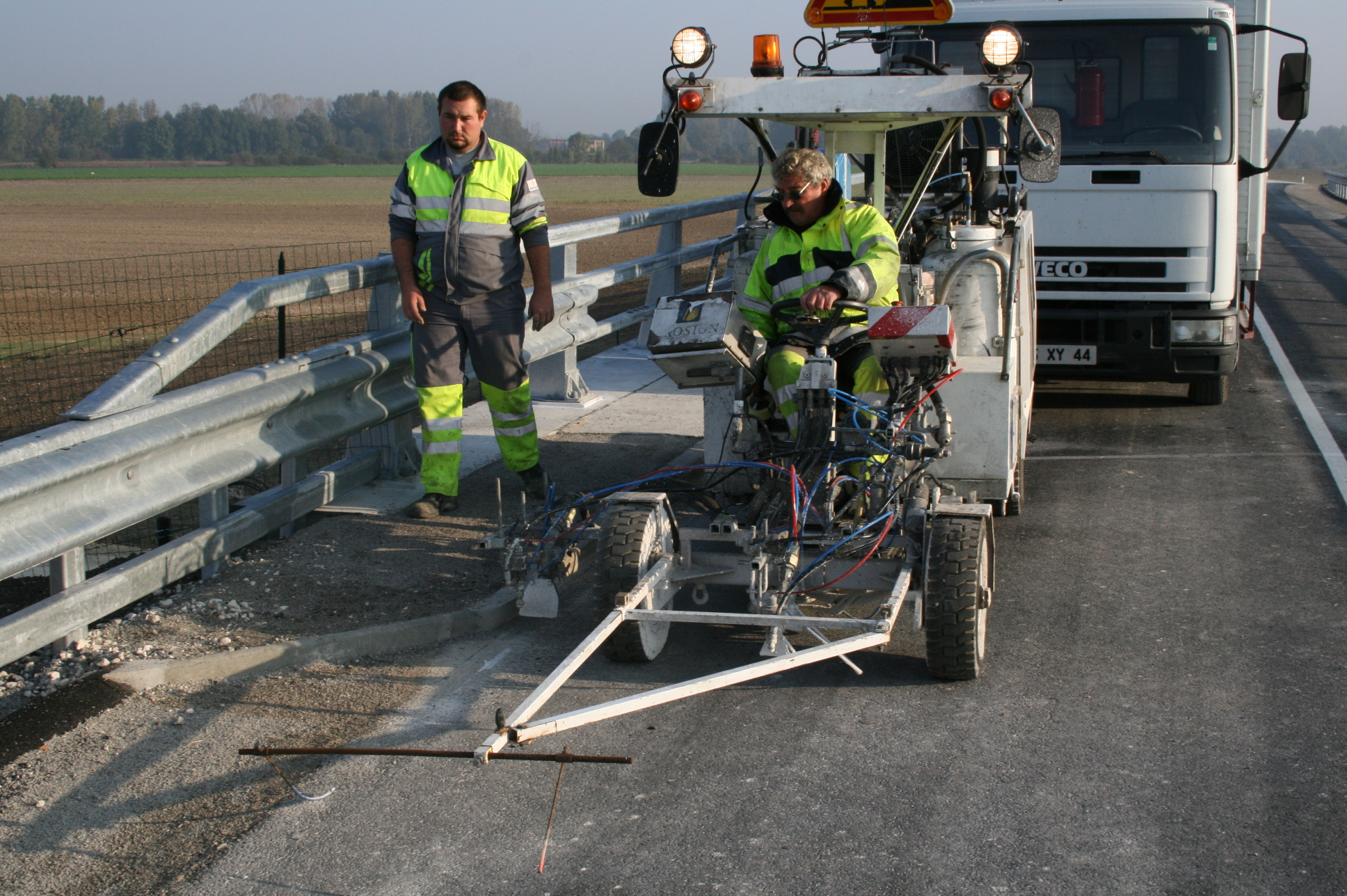 Machine de marquage